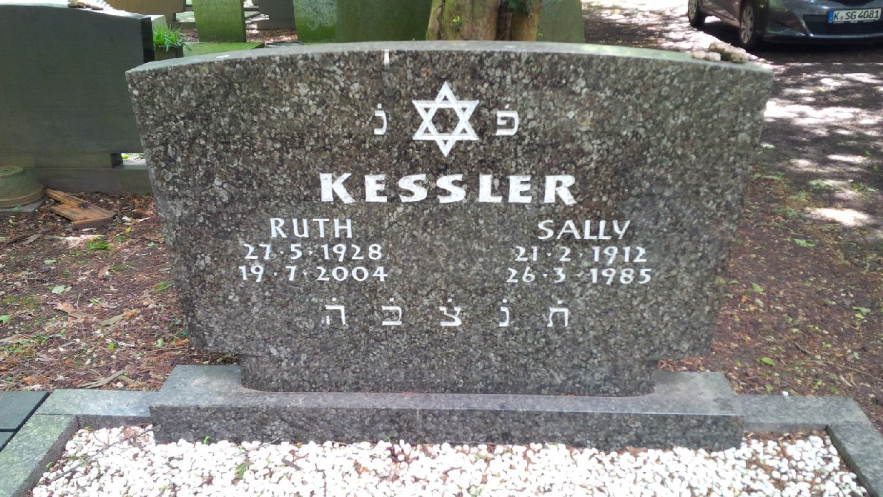 Grabstein von Ruth und Sally Kessler auf dem Jüdischen Friedhof in Köln-Bocklemünd